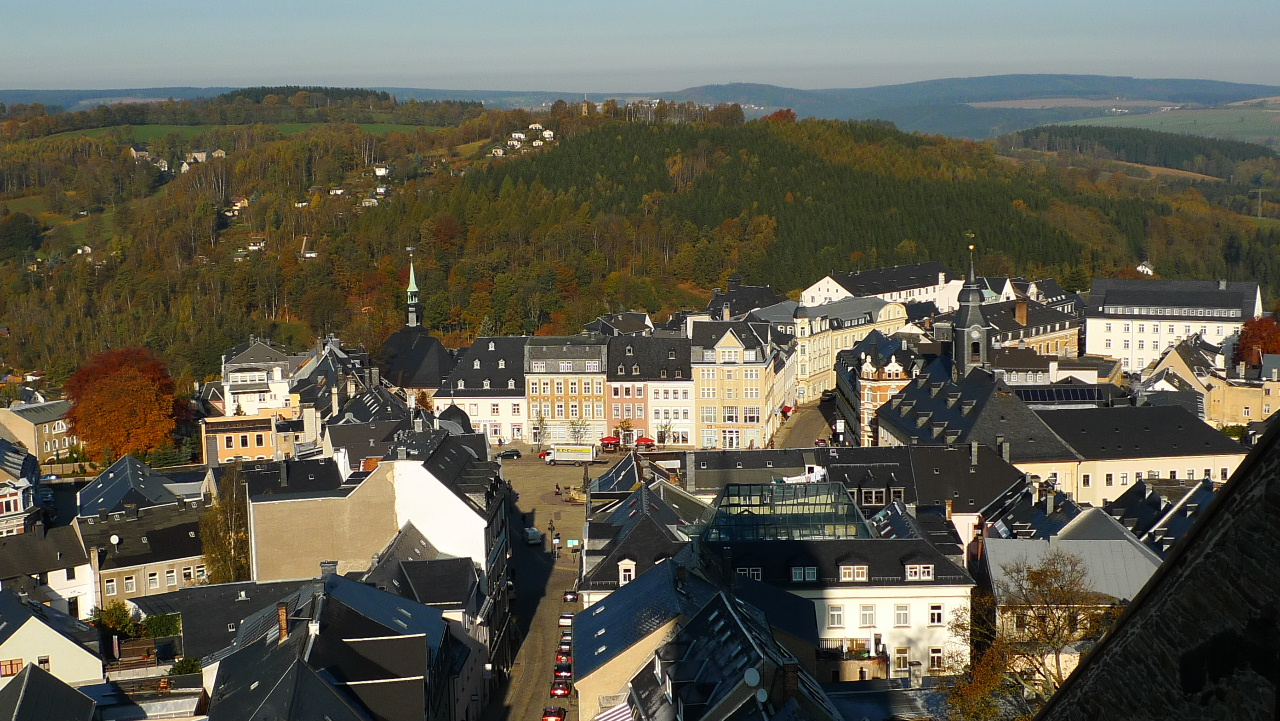 Blick vom Turm der St.-Annen-Kirche auf die Stadt und das Erzgebirge